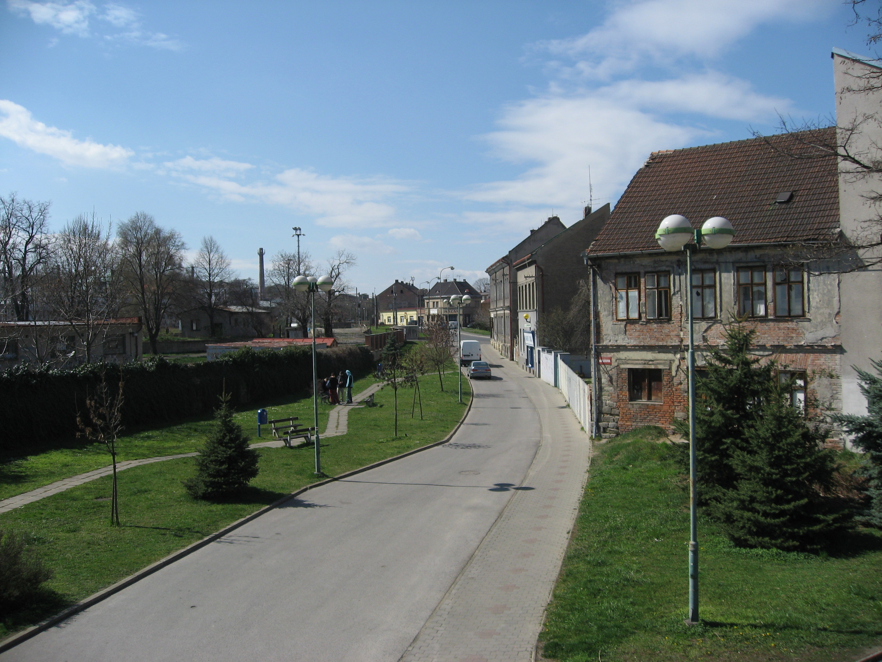 Česky: Kralupy nad Vltavou, Kaplířova ulice, parčík.